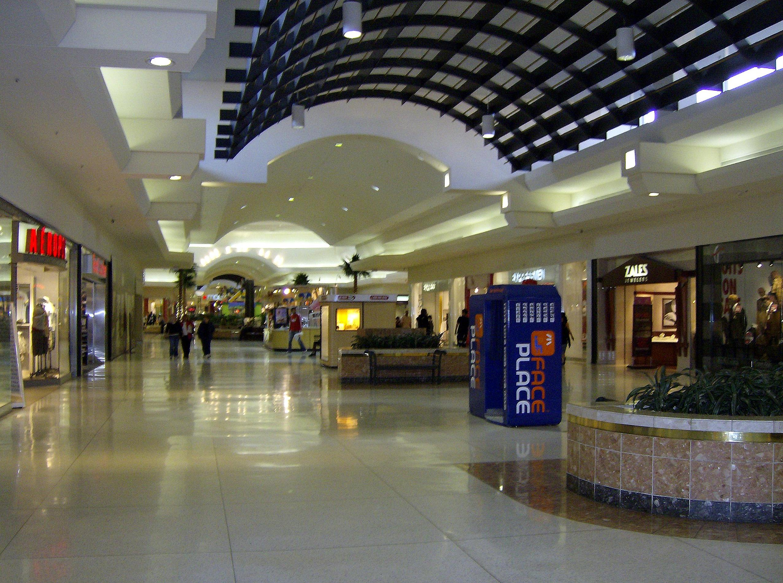 Home page